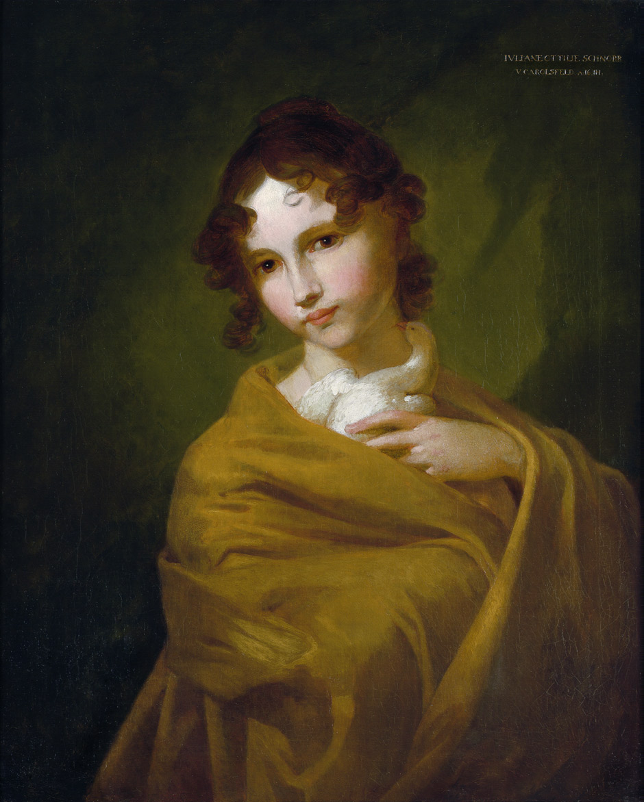 Bildnis der Tochter Juliane Ottilie Schnorr von Carolsfeld (1792-1879) mit einer weißen Taube. (Schwester des bekannten Malers Julius Schnorr von Carolsfeld). Oben rechts betitelt: "IVULIANE OTTILIE SCHNORR / V.CAROLSFELD A:16.IH:" 1808/1809.